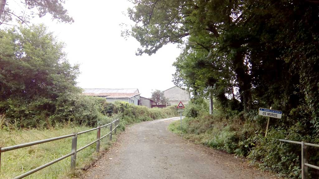 Vista dos Muros, Curtis.